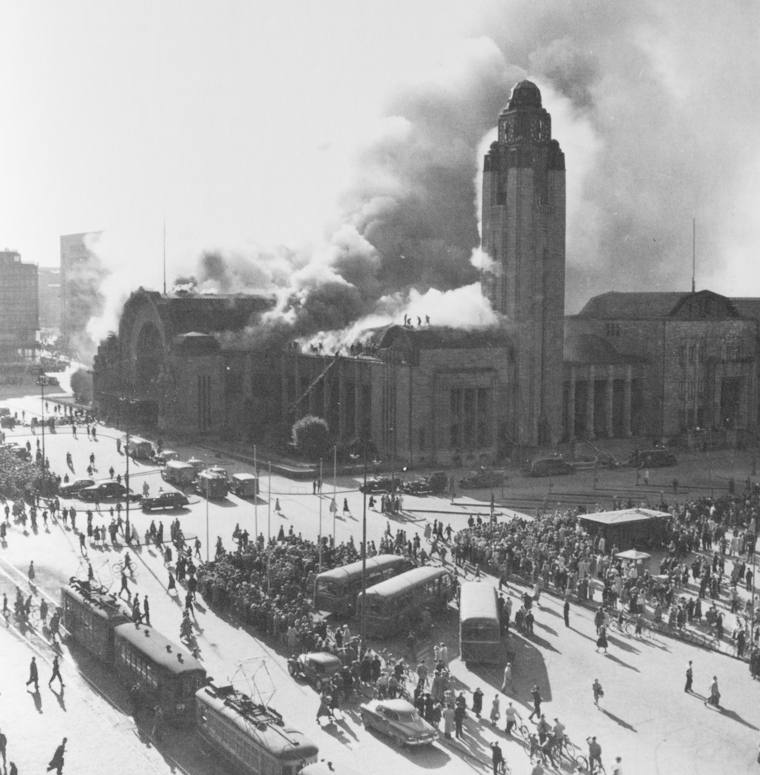 Helsingin rautatieaseman tulipalo tuhosi 14. kesäkuuta 1950 asemarakennuksen ullakon, vesikaton ja päätelaiturikatoksen.